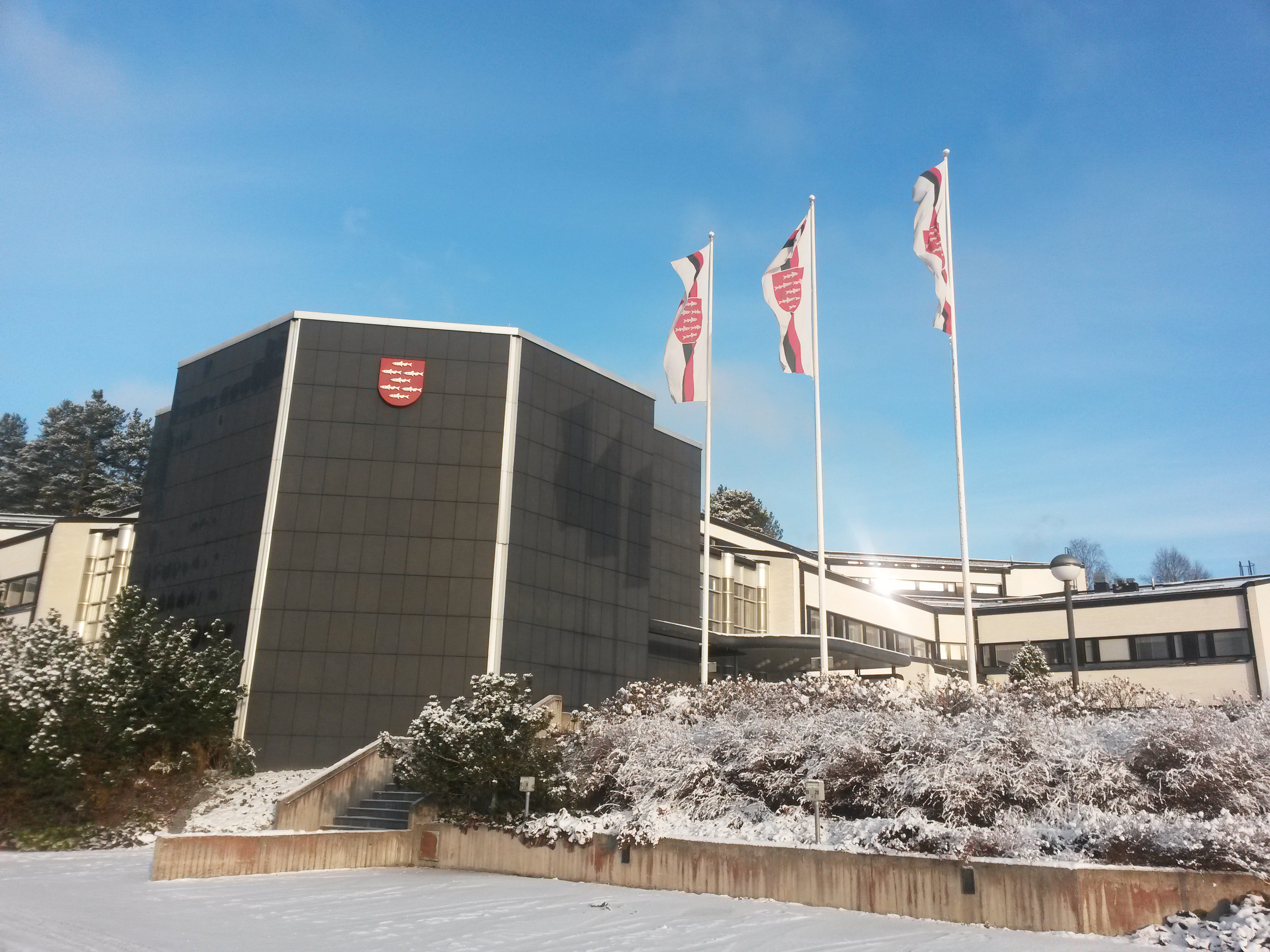 Viitasaaren kaupungintalo.